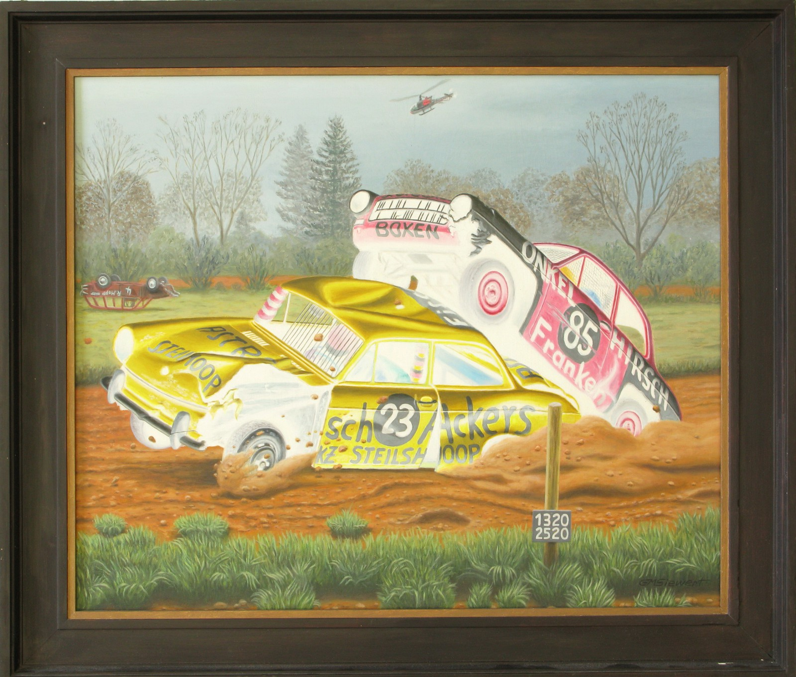 Ölgemälde von G.M.Siewert: Autocrash beim Stockcarrennen